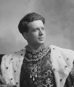 Manfredi Polverosi fotografato da Mario Nunes Vais